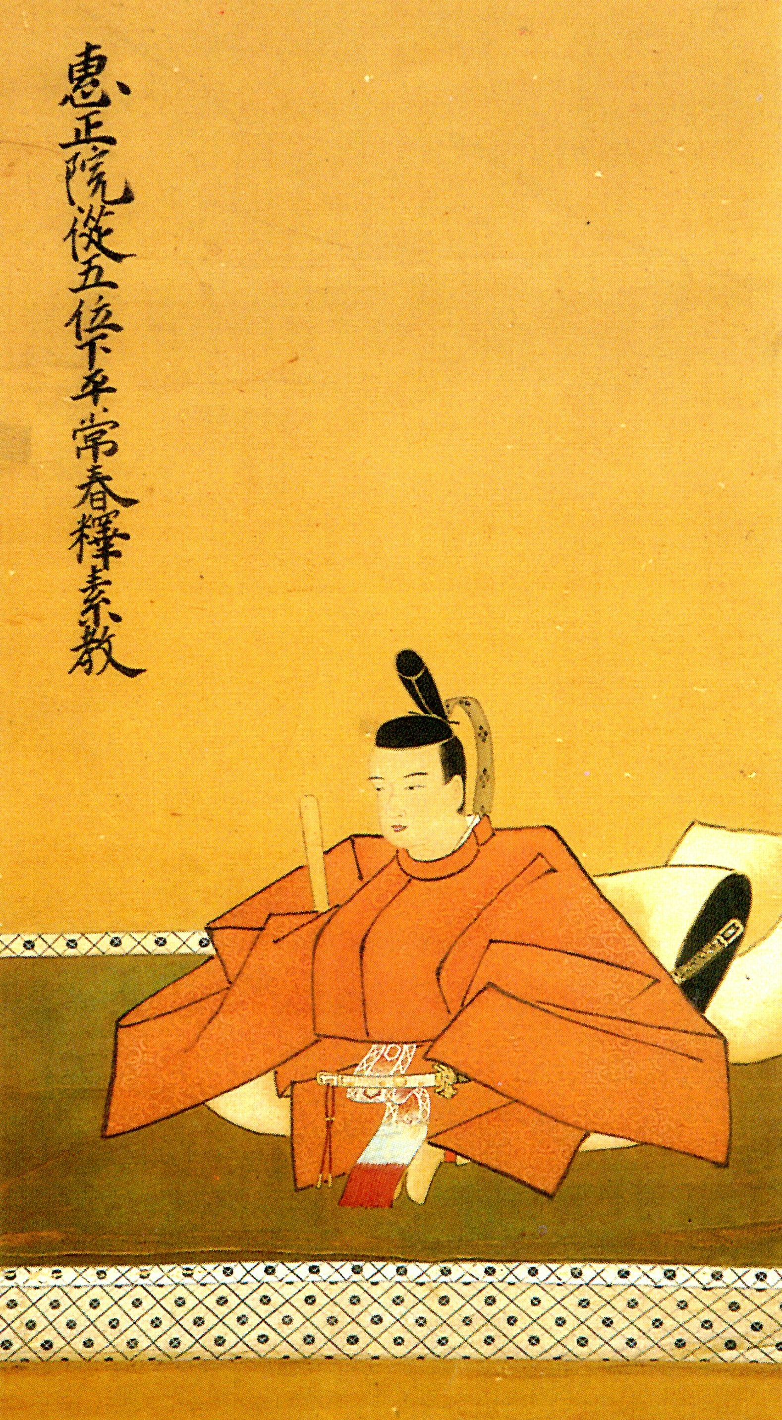 遠藤常春の肖像。